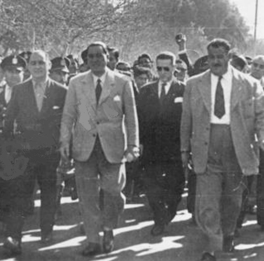 Raúl Lucini y Juan D. Perón en 1953